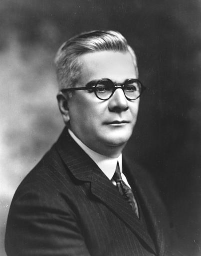 Geraldo Machado, 1871 - 1939